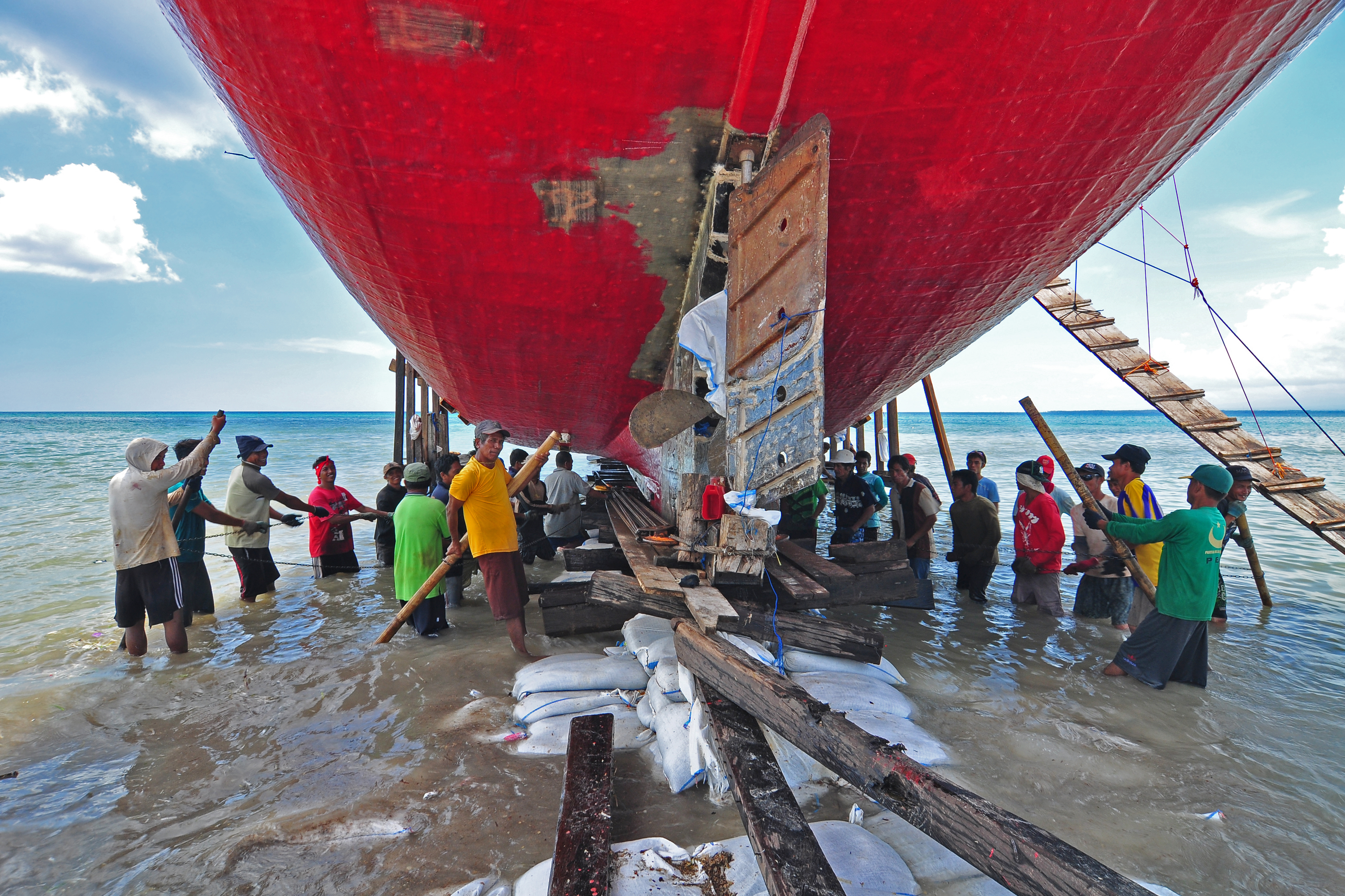 Annyorong lopi , Bontubahari, Bulukumba, Sulawesi Selatan